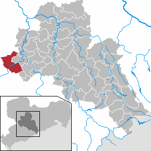 Penig in Saxony - district Mittelsachsen